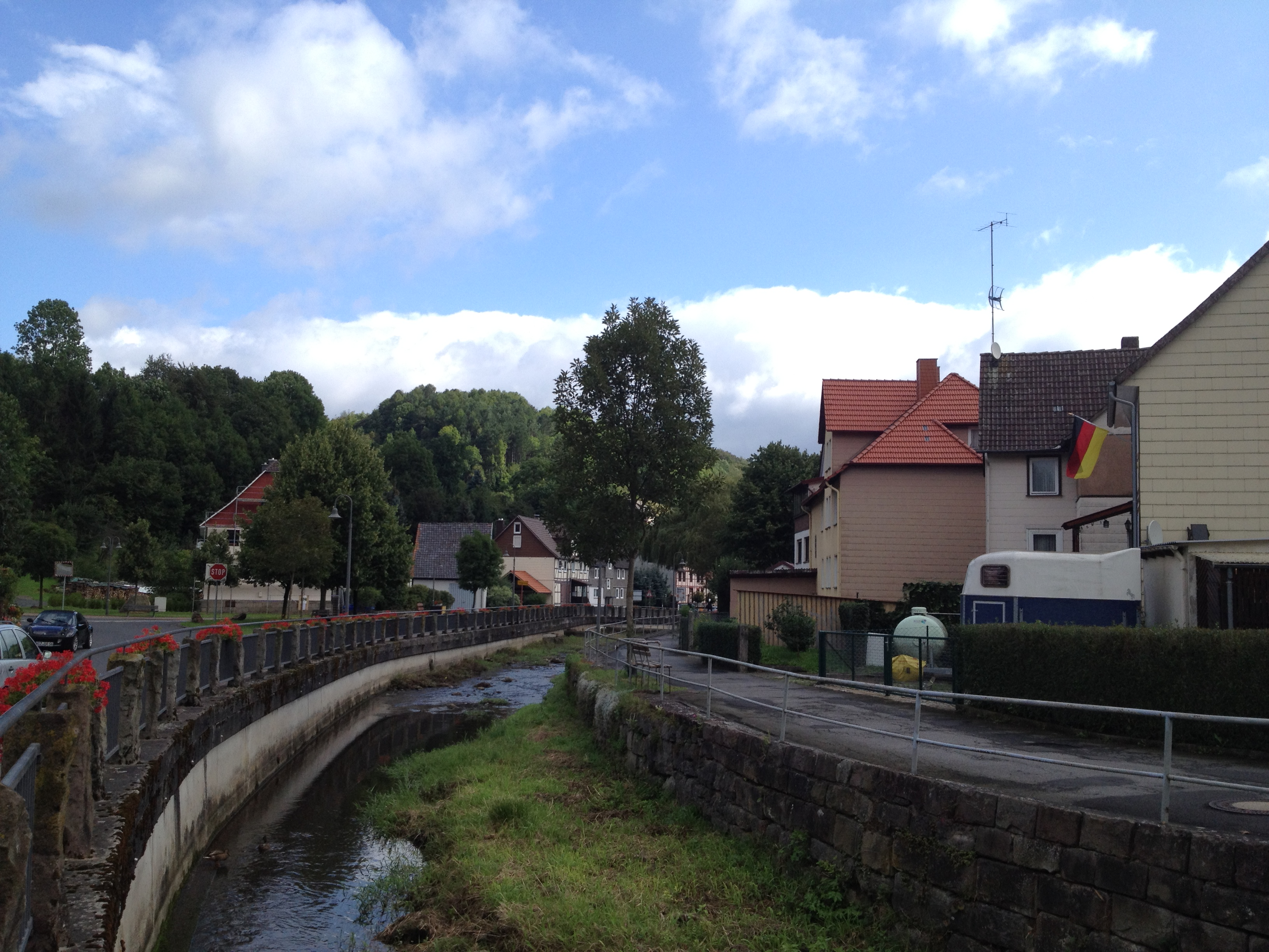 Herkules-Wartburg-Radweg Alternativstrecke und Meißner-Radrundtour in Trubenhausen entlang der Gelster; rechts Haupstraße; links An der Gelster